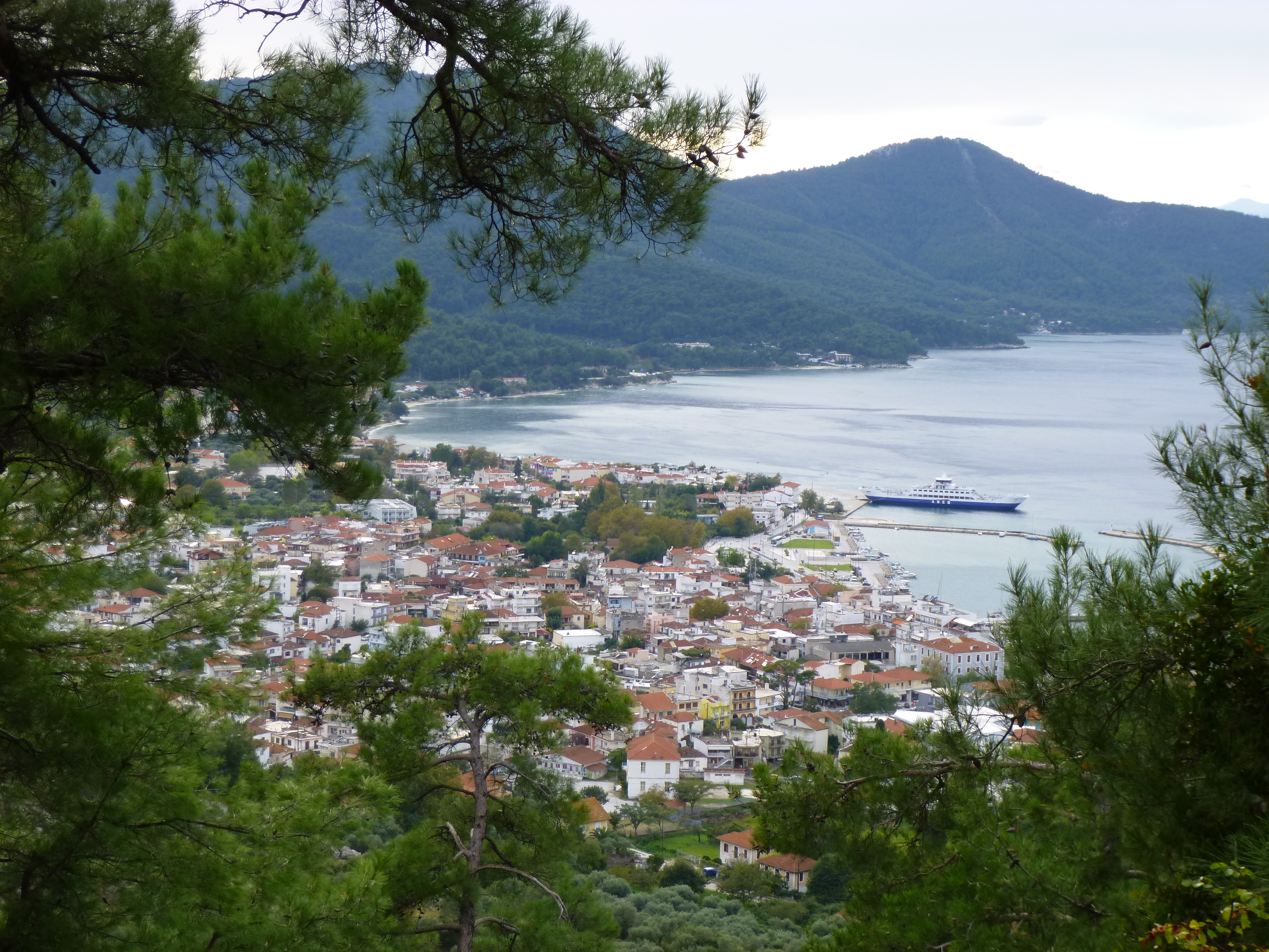 Blick von der historischen Stadtmauer auf die Inselhauptstadt Limenas, Insel Thassos, Griechenland.